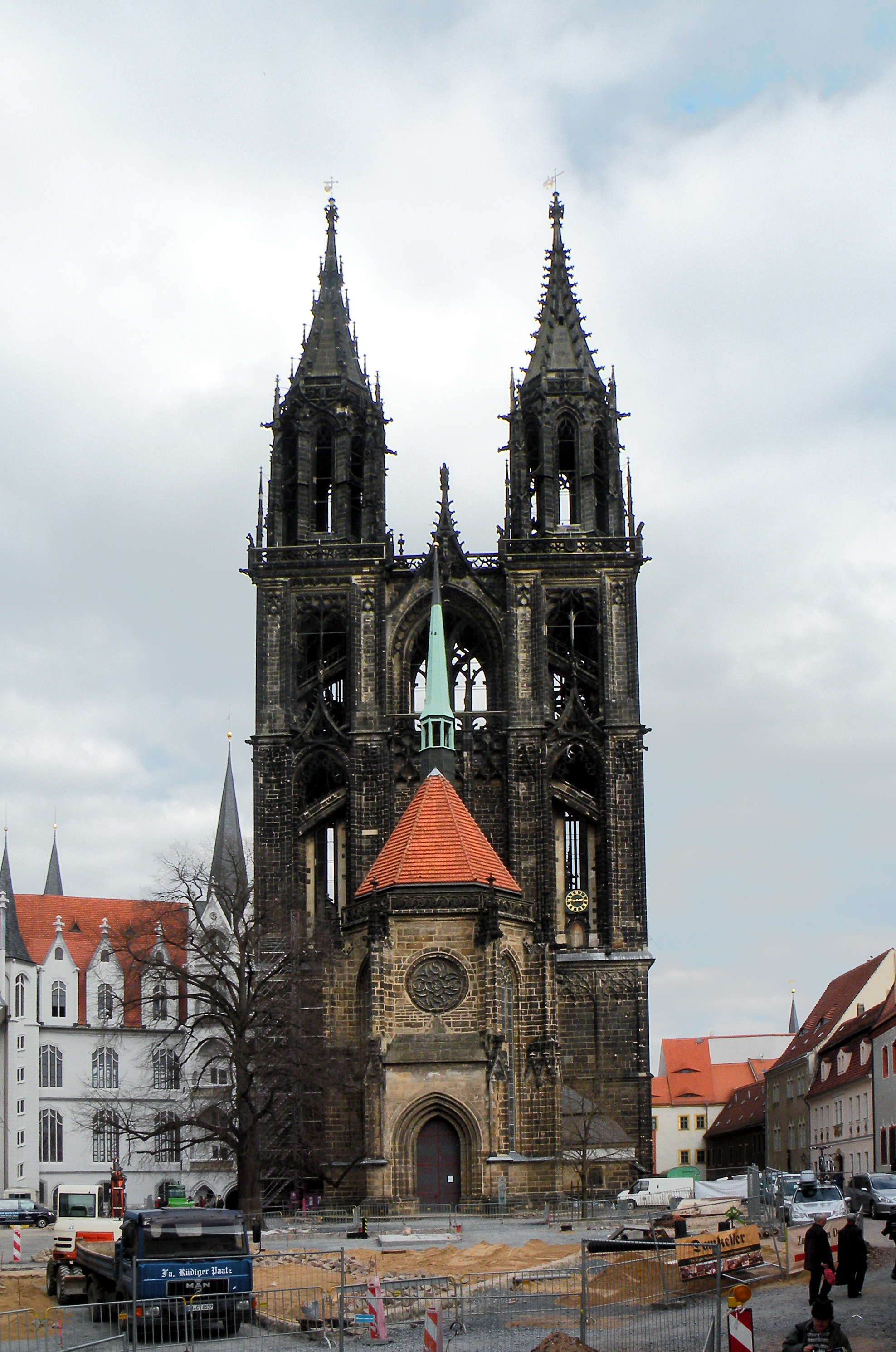 Мейсен.Собор.